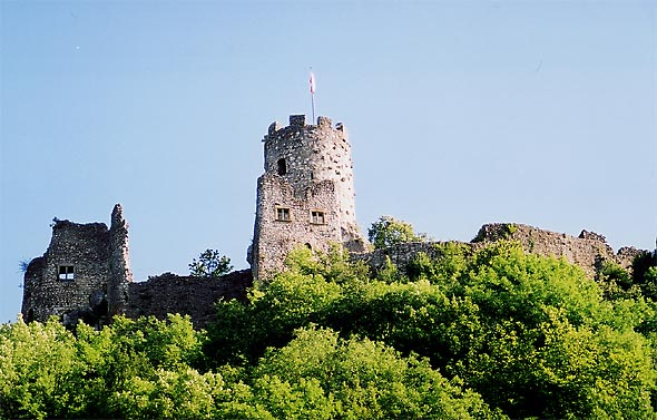 Ruine Neu-Falkenstein oberhalb von Balsthal